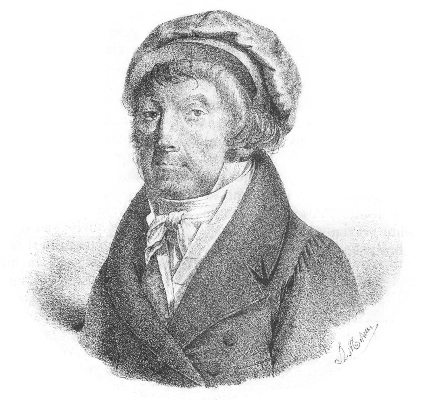 incisione ottocentesca di Melchiorre Delfico, tratto dal periodico Omnibus pittoresco - Napoli - 1835. Opera di autore sconosciuto, morto da più di settant'anni, acquisita da scanner